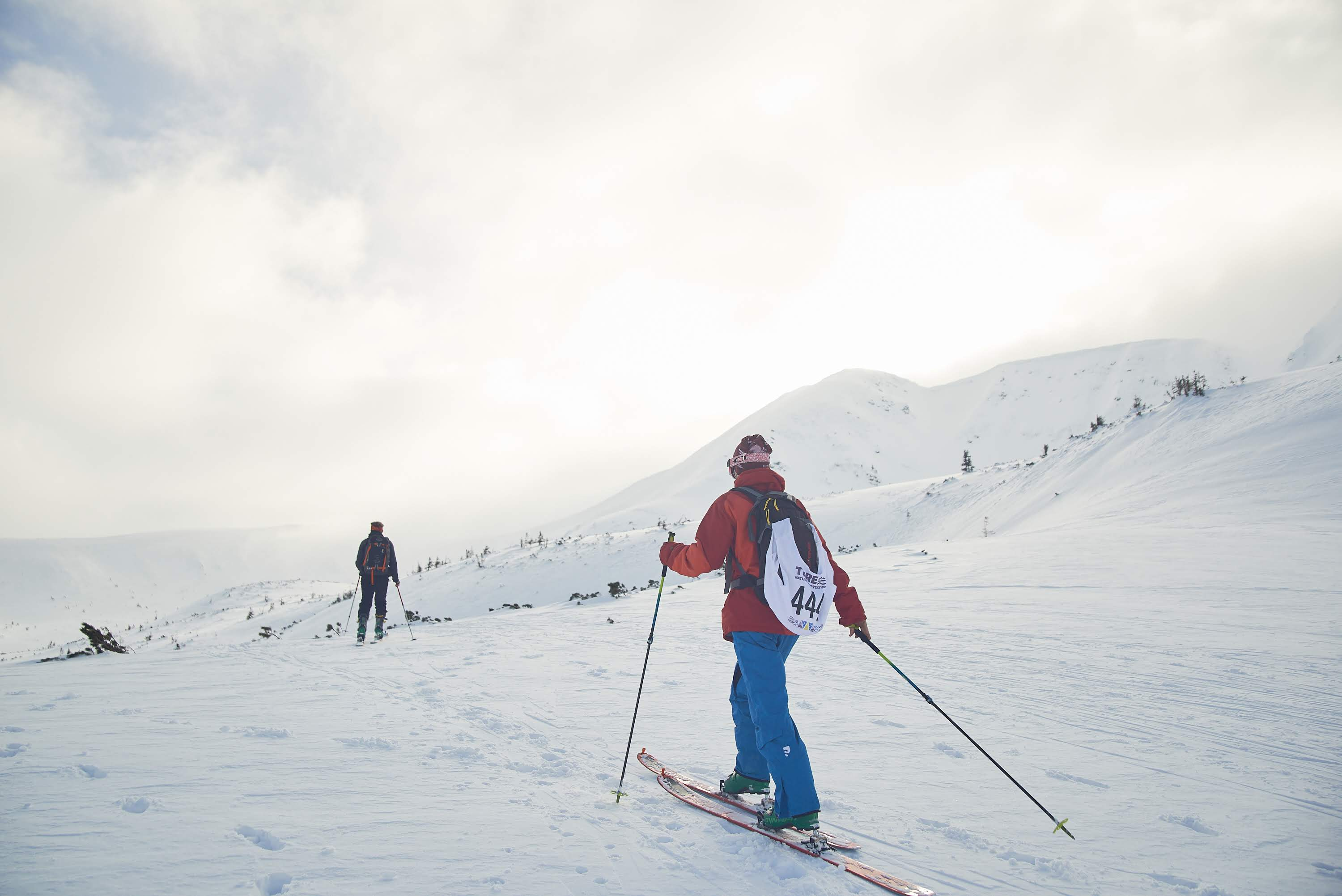 Лижники на трасі Кубку Білого Слона 2018